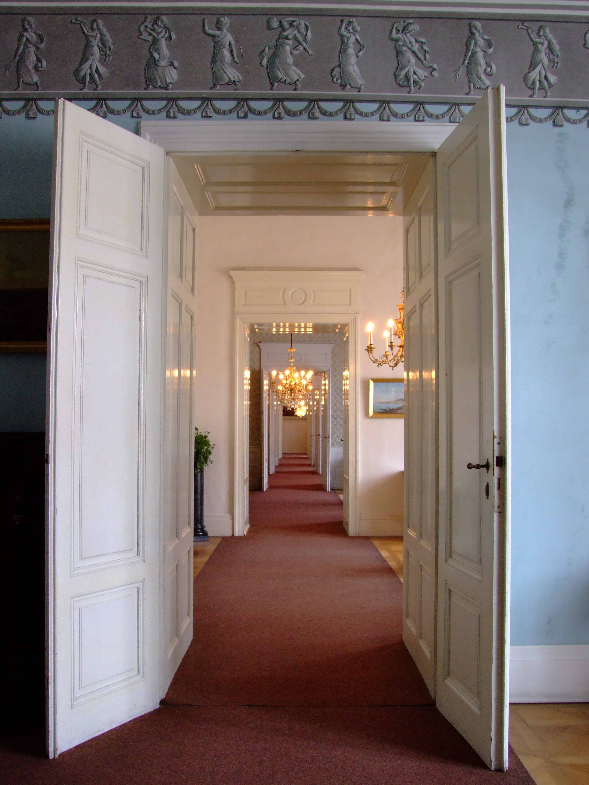 Enfiláda na zámku Opočno. Dveře propojují jednotlivé hostinské pokoje.